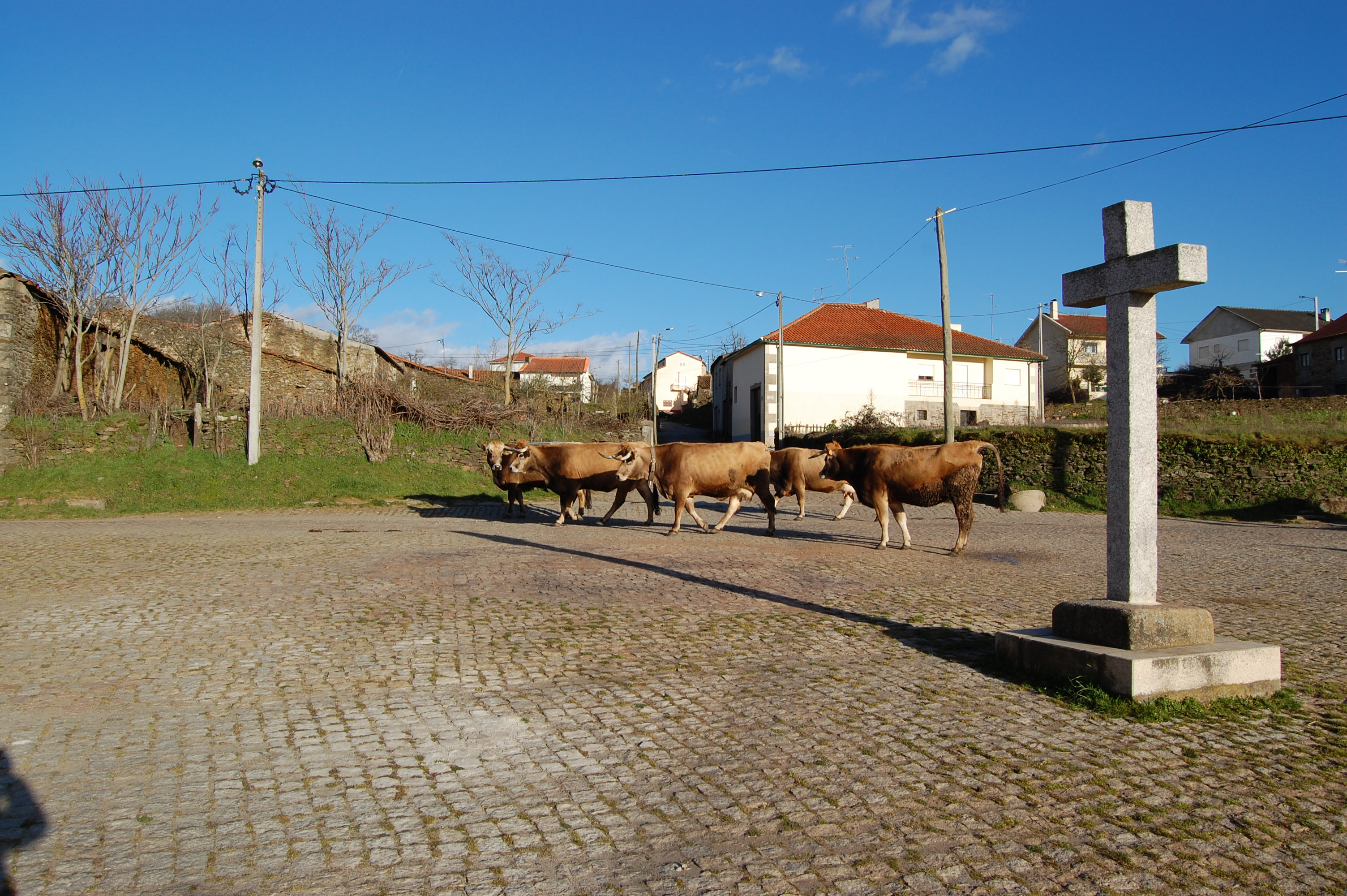 A aldeira de Angueira, concelho de Vimioso, no nordeste de Portugal.